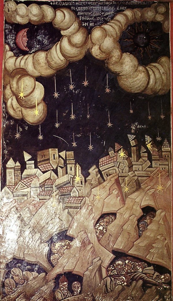 Die Kl�ster Dionysiou und Dochiariou befinden sich auf dem Berg Athos in Griechenlands, wo sich zahlreiche Kl�ster nach dem griechisch-orthodoxen Ritus niedergelassen haben. Die Klosteranlagen von Dionysiou als auch von Dochiariou enthalten Fresken zur Apokalypse, die kompositorisch in Abh�ngigkeit zueinander stehen. Die jeweils 21 Bilder stammen aus der zweiten H�lfte des 16. Jahrhunderts. Bei den Bilderzyklen muss von einer Kenntnis der Apokalypsedarstellung von Hans Holbein ausgegangen werden. Bis zu diesen Darstellungen war in der orthodoxen Kirche die Apokalypse kaum bildlich thematisiert worden, doch mit Dionysiou setzt eine neue Tendenz ein.